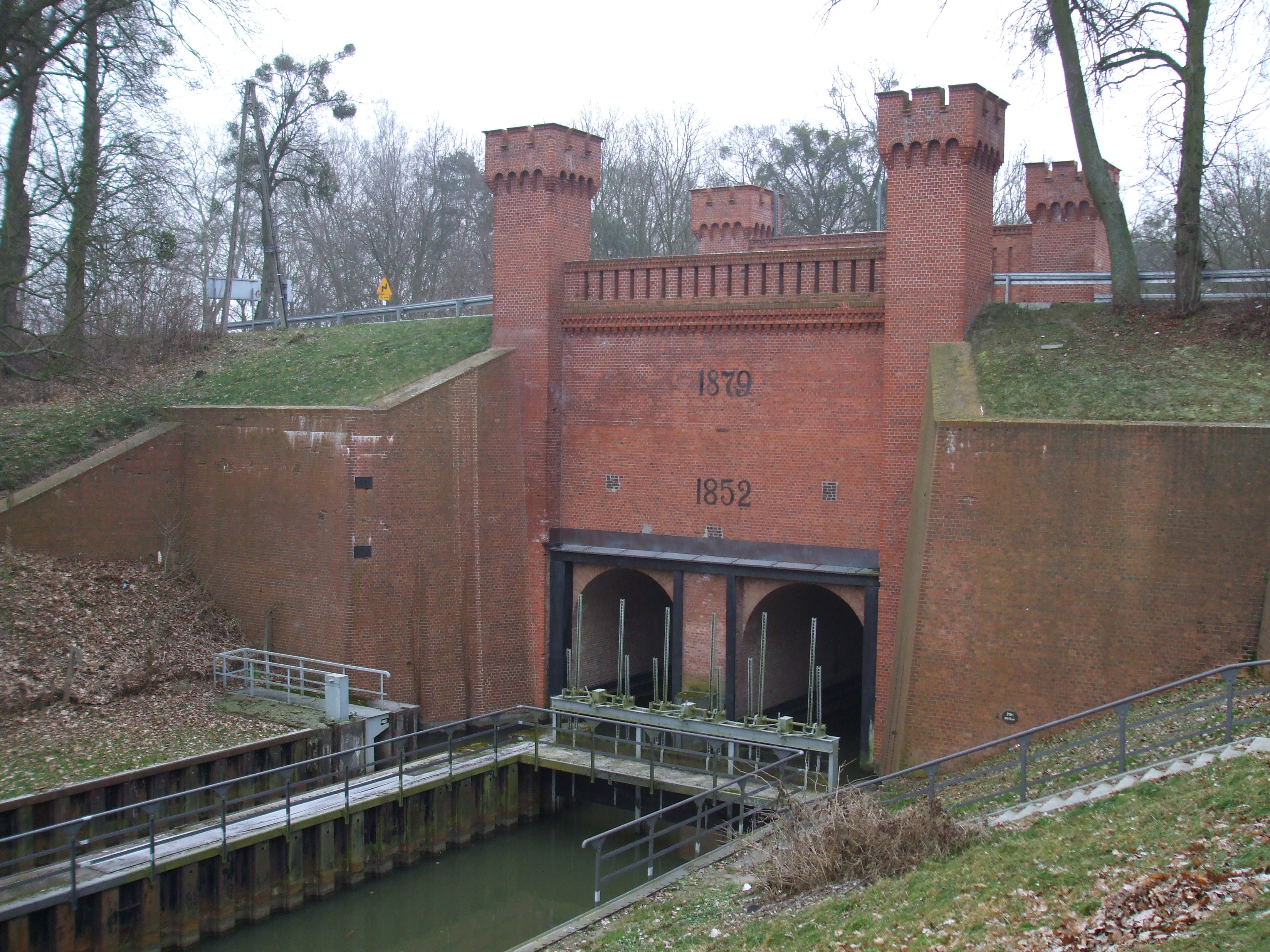 Biała Góra w województwie pomorskim, śluza na rzece Nogat.